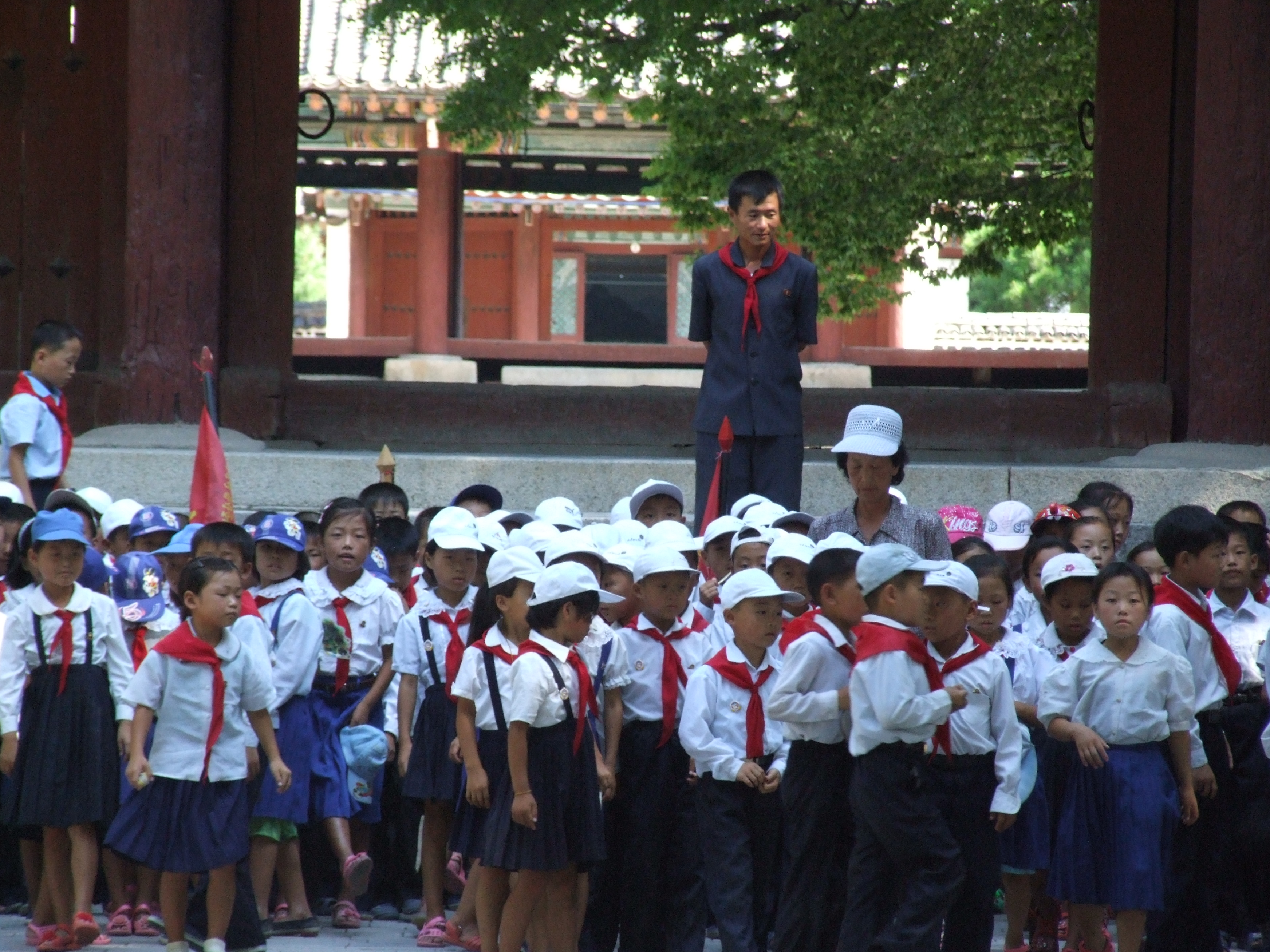 Schulkinder in Kaesong, Nordkorea